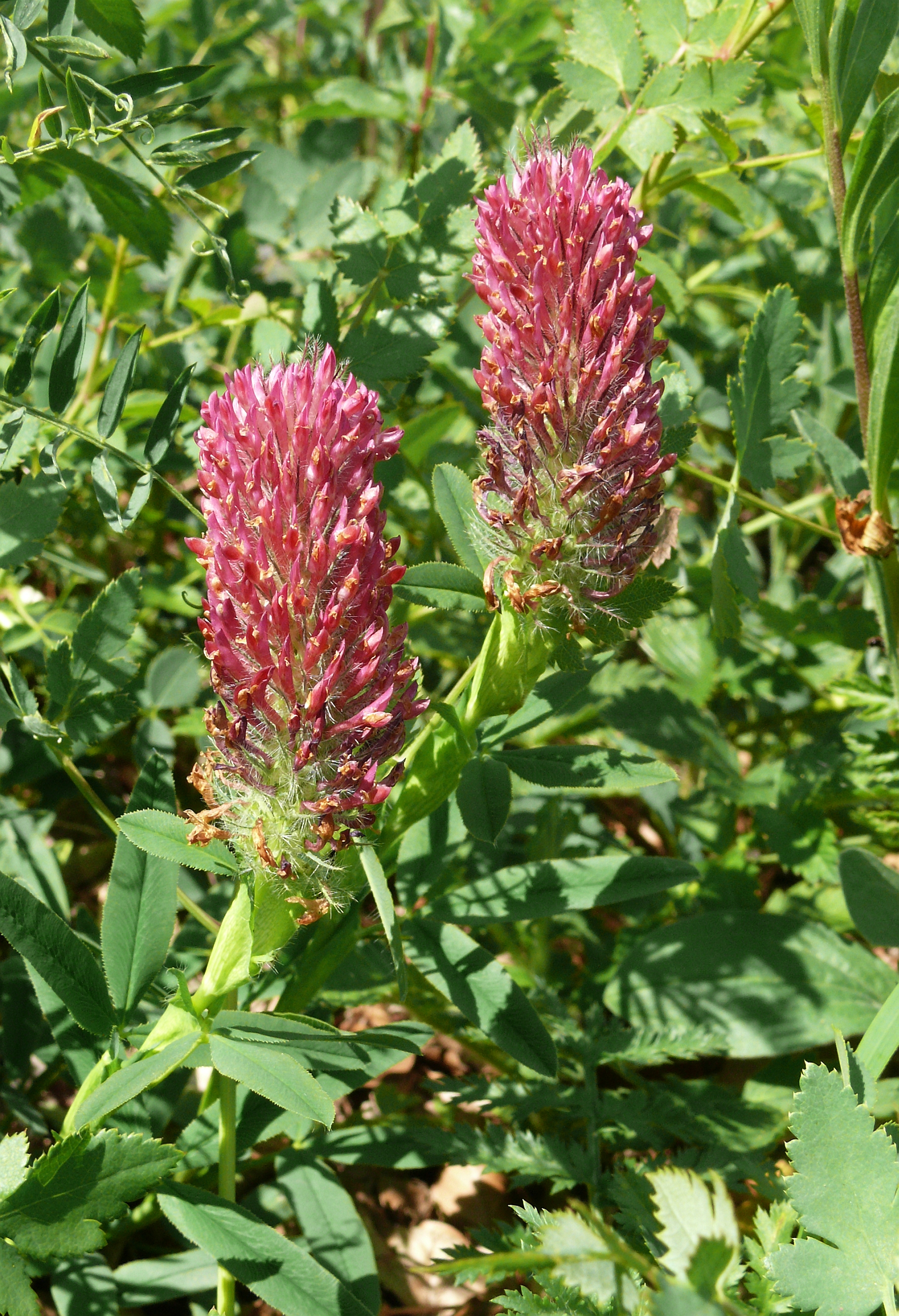 Trifolium rubens, Tauberland, Deutschland